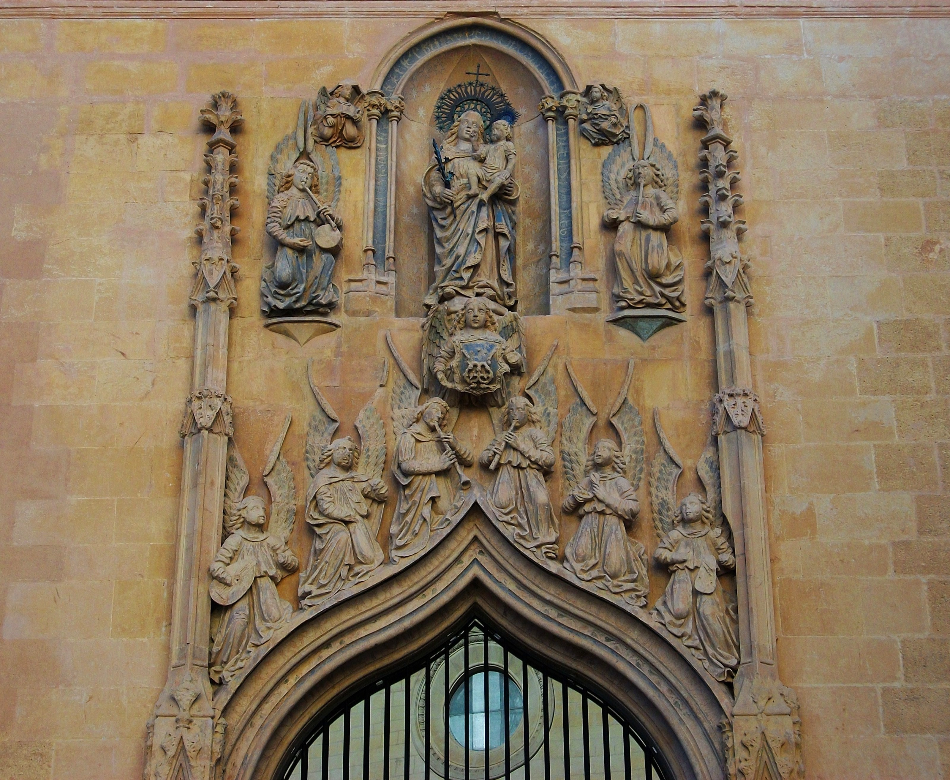 Detall de la portada de la capella de l'Hospital Reial de Xàtiva, amb àngels músics que envolten a la Mare de Déu.